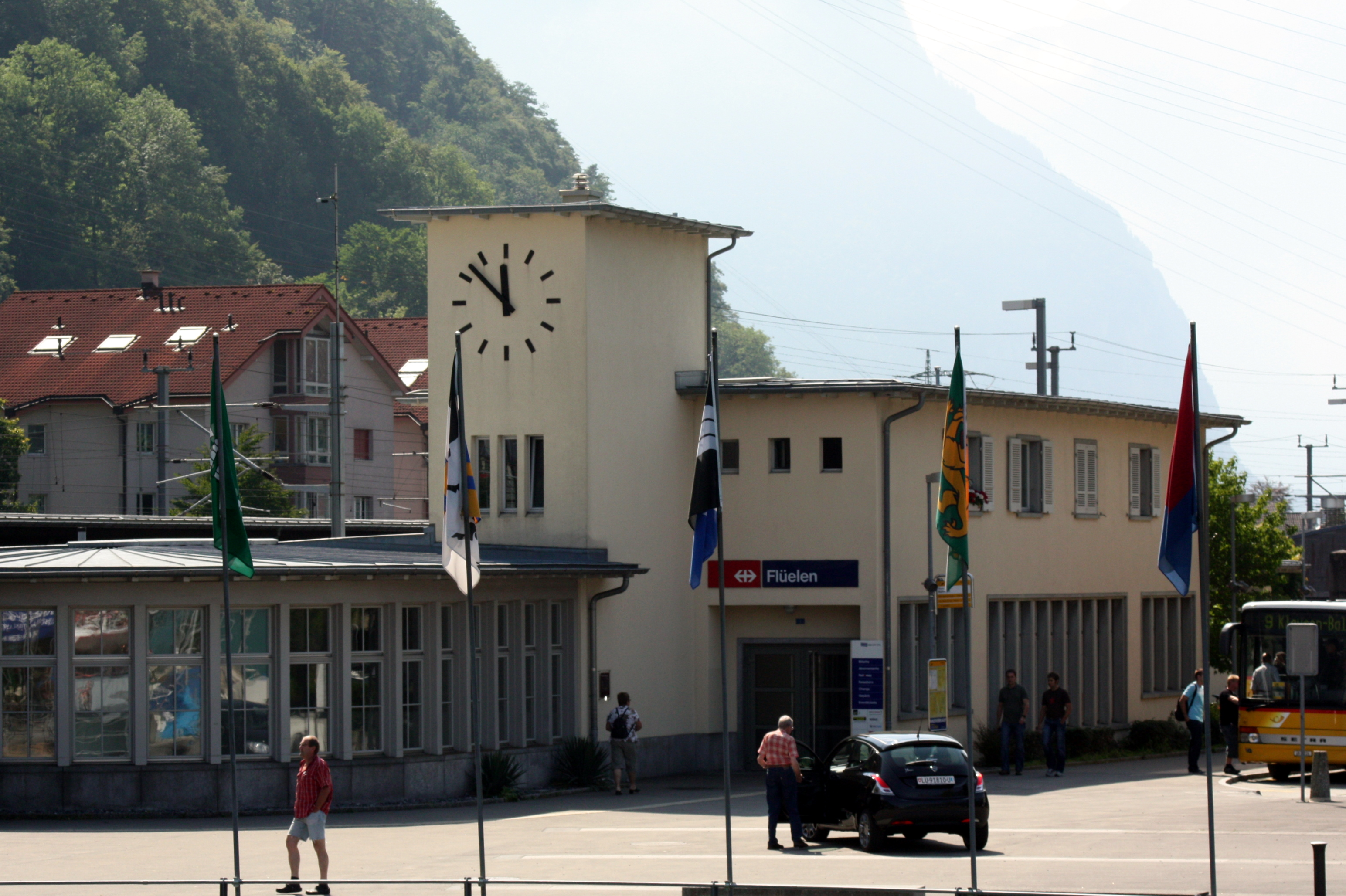 Stationsgebäude Flüelen